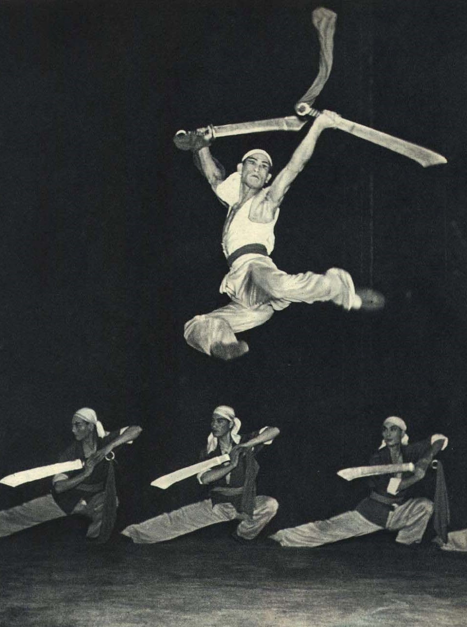 1963-05 1963年 中央歌舞团大刀进行曲